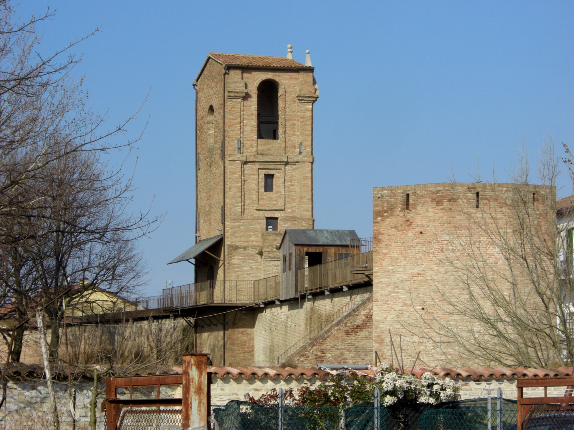 Castello Malatestiano This is a photo of a monument which is part of cultural heritage of Italy.